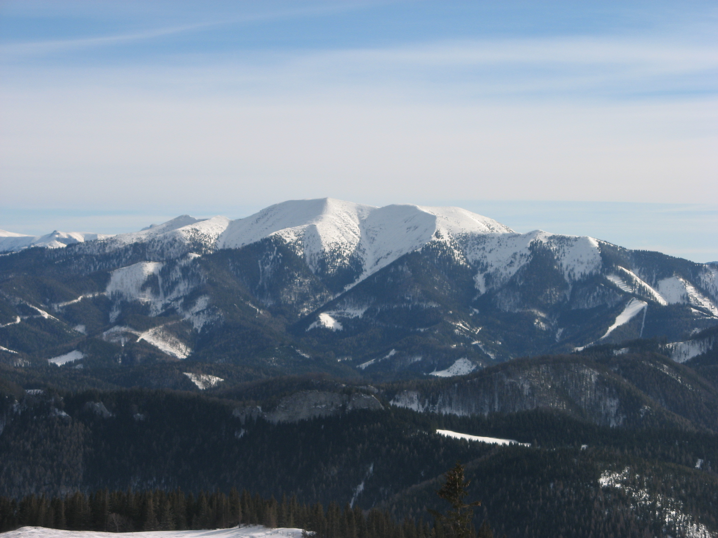 Dem Norden zugewandte Seite des Göllers